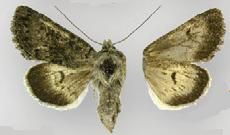 Lasionycta leucocycla leucocycla female